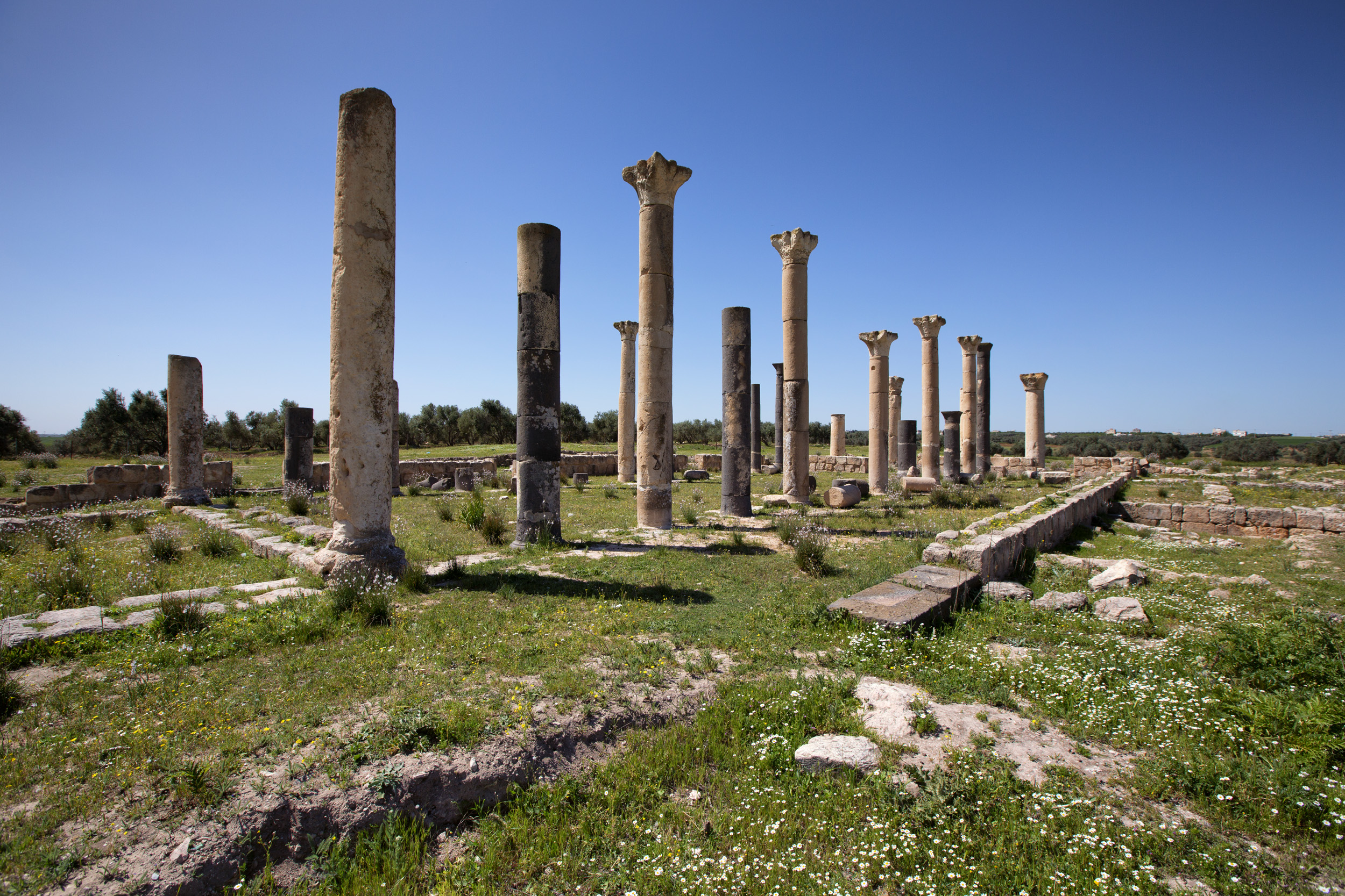 Abila (Decapolis)